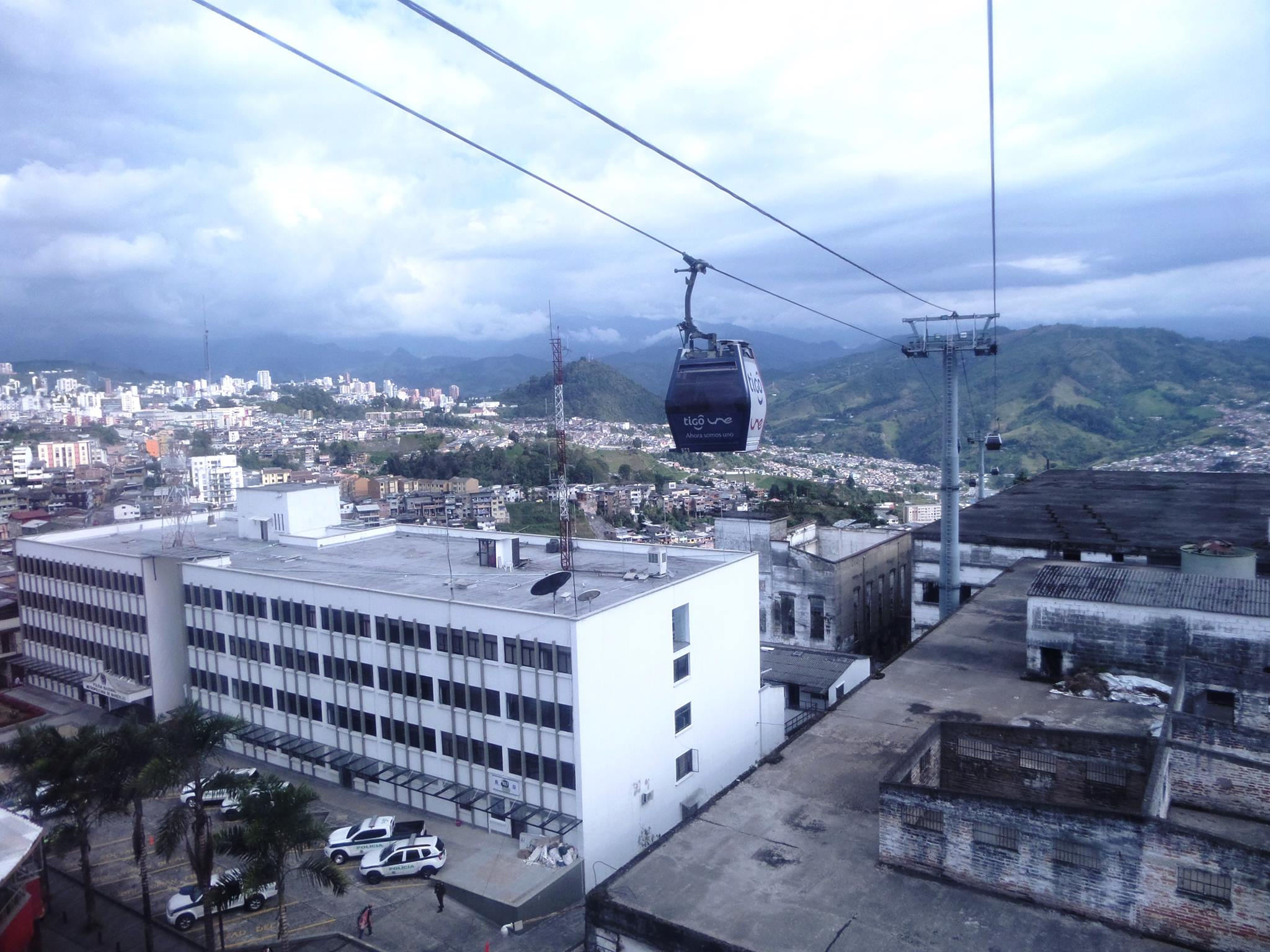 Cable aereo manizales